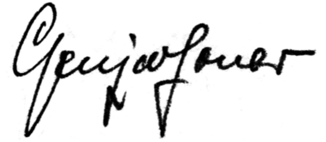 Signatur der Fotografin Genja Jonas